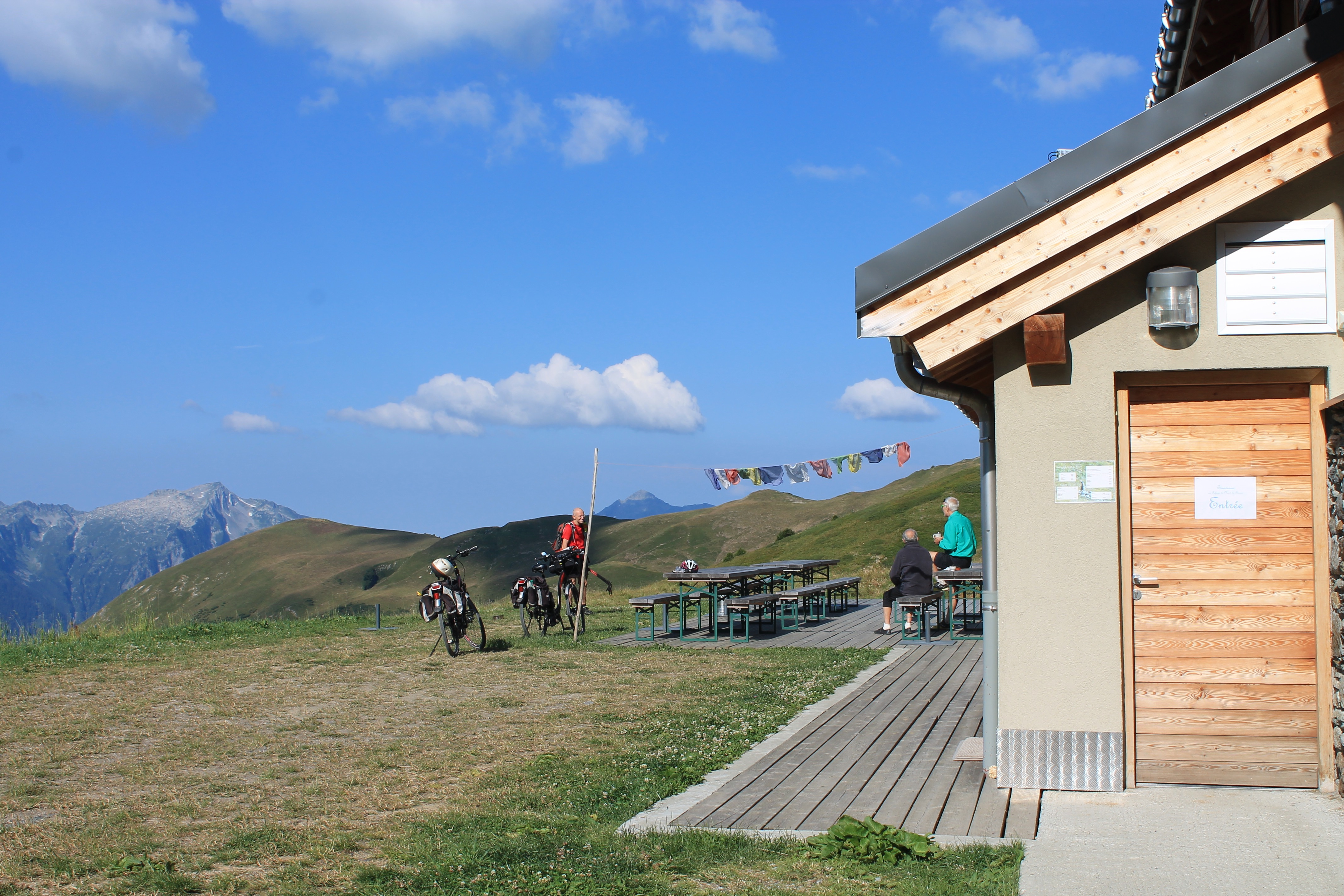 Refuge du Nant du Beurre (2080 m).